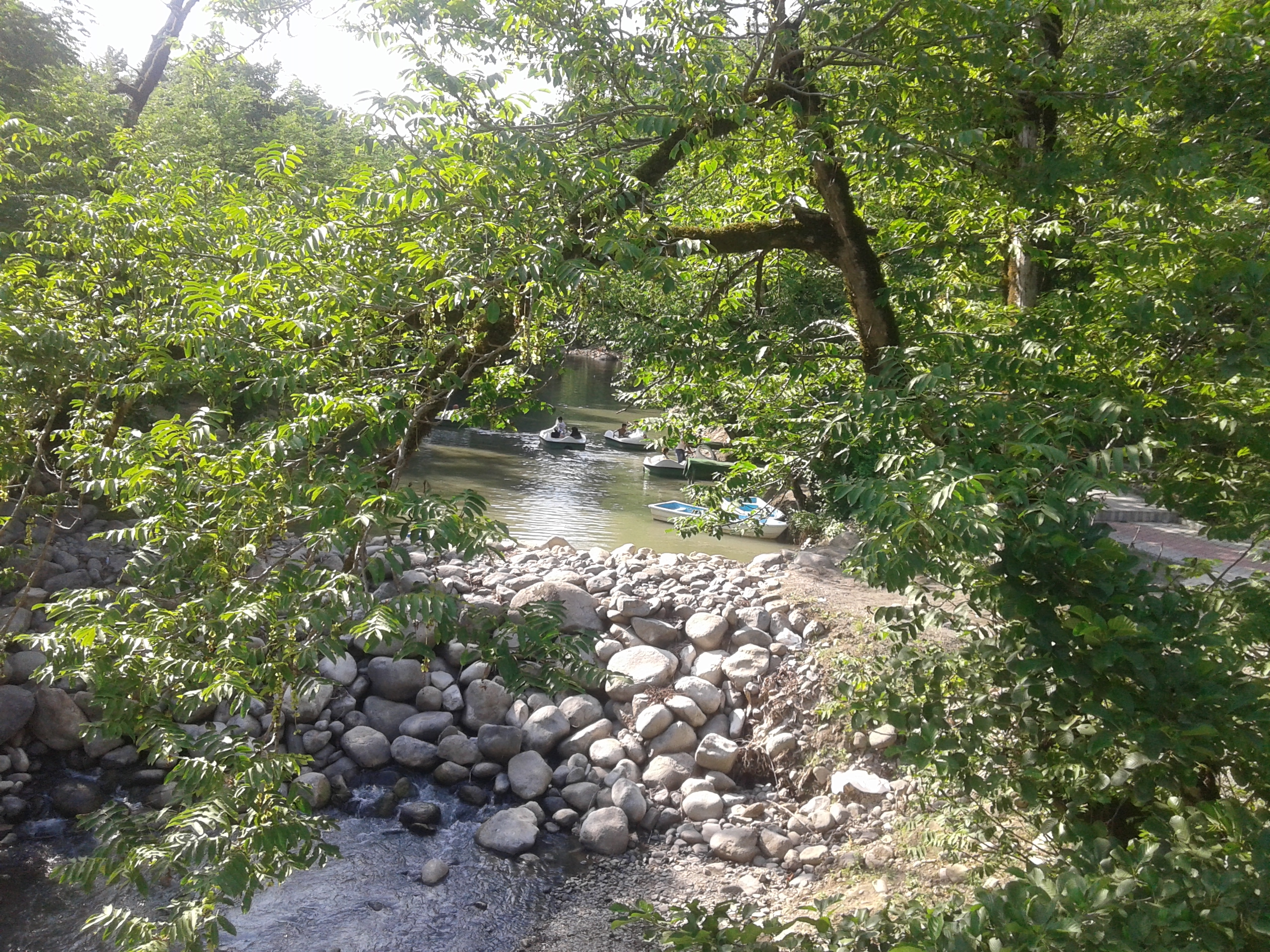 Çay dayaz 1